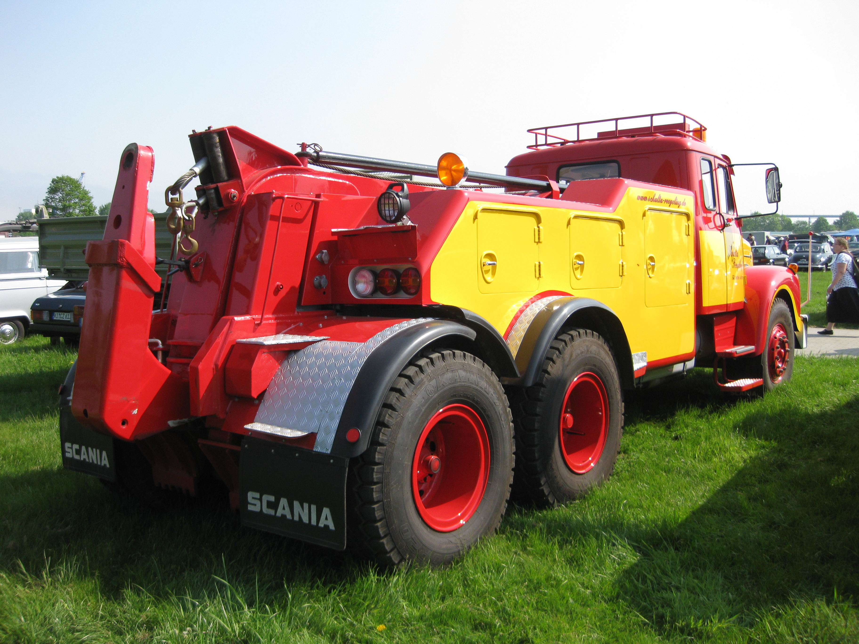 Scania 110 Super